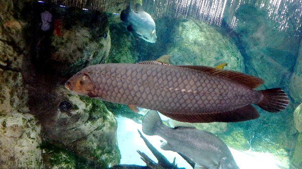 Heterotis niloticus Public aquarium Singapore 10-9-2015 60cm